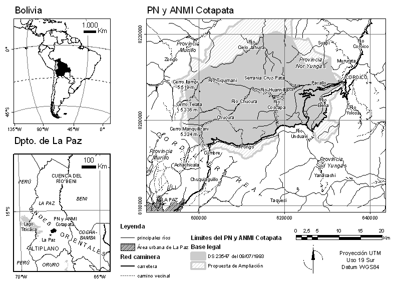 Localization map of Cotapata National Park & Integrated Management Natural - Mapa de localización del Parque Nacional y Área Natural de Manejo Integrado Cotapata (Bolivia)